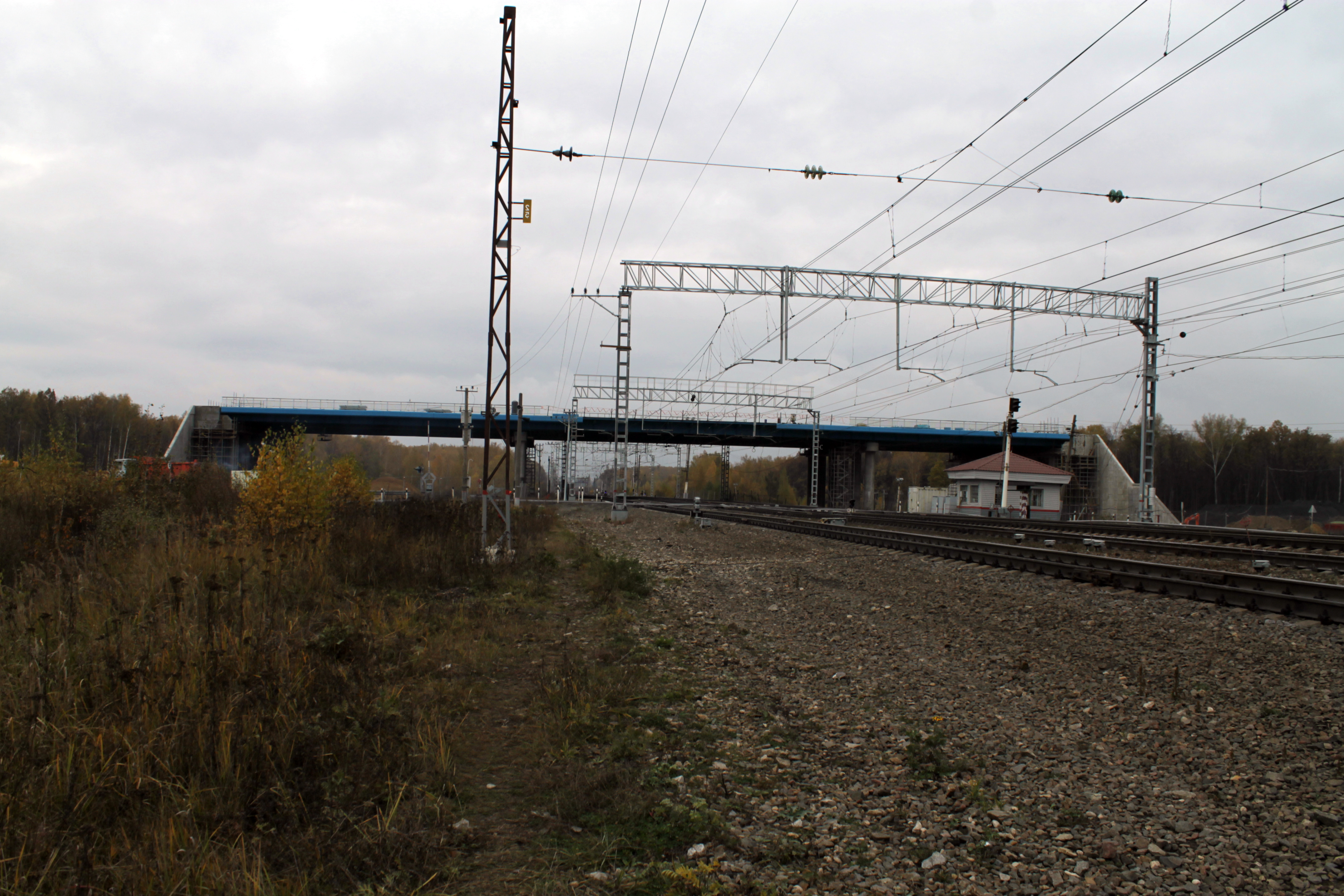 Изображение строящейся автомобильной развязки в районе железнодорожного переезда Жилёво